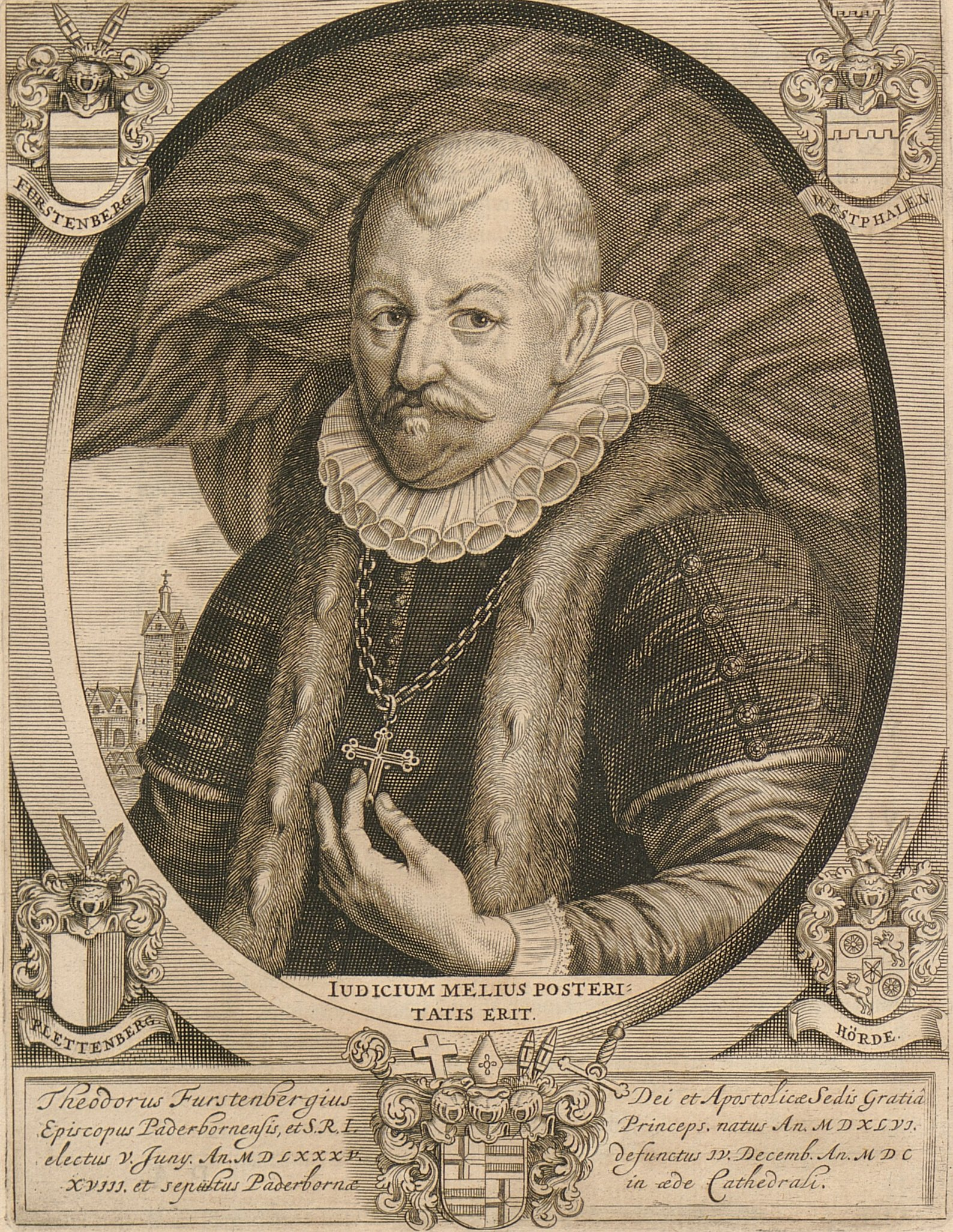 Dietrich von Fürstenberg, Fürstbischof von Paderborn